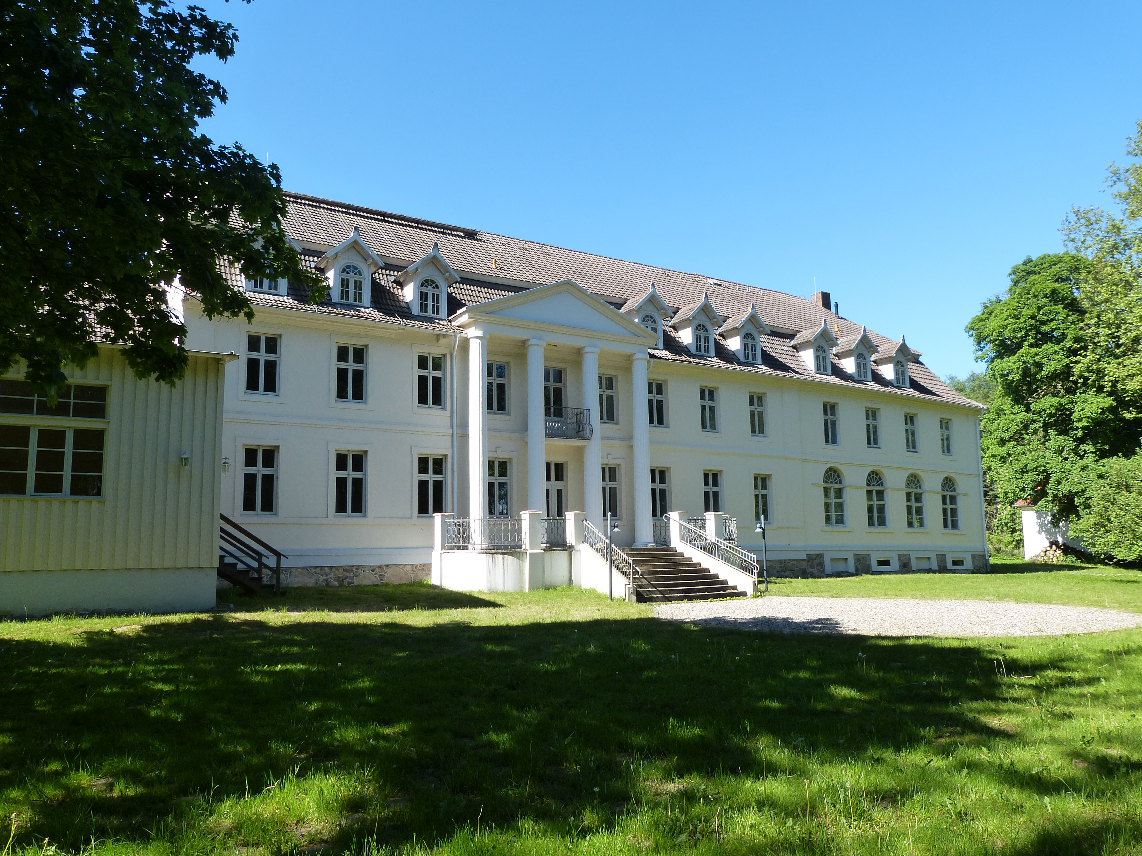 Herrenhaus Buggenhagen, Parkseite, Ansicht von Süden